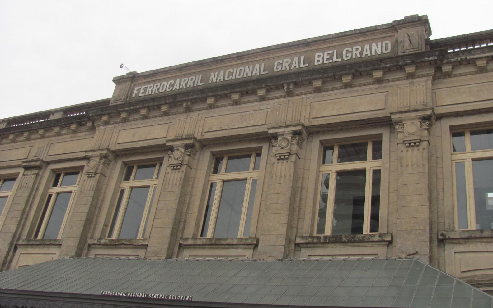 Estación Santa Fe, Ferrocarril Belgrano, Argentina.